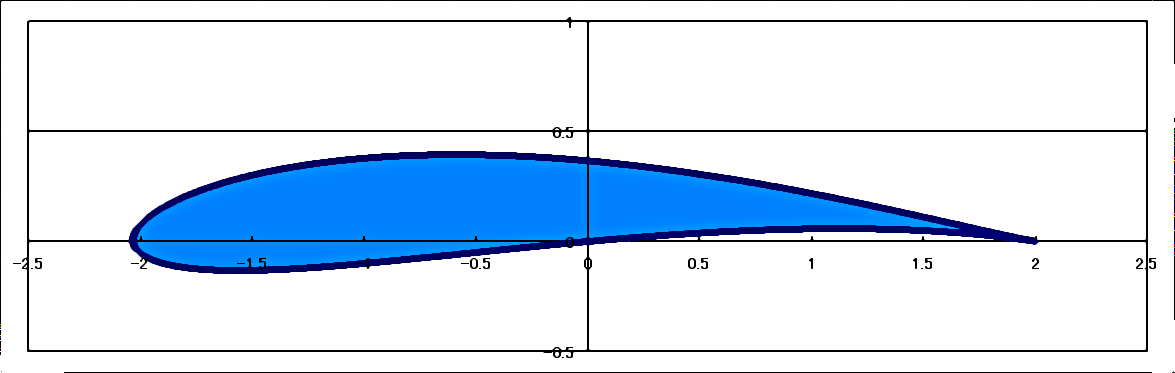 joukowsky airfoil